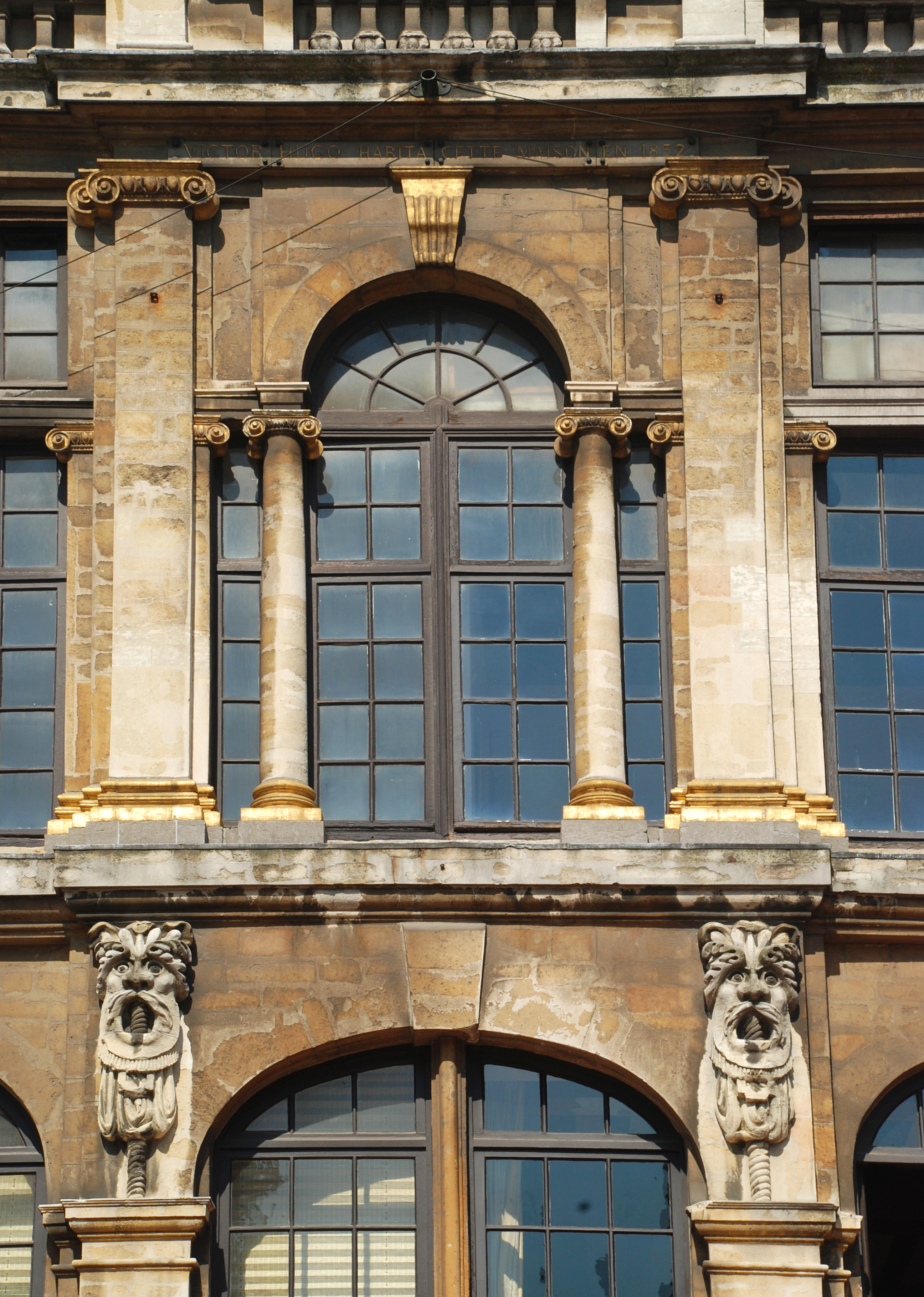 Belgique - Bruxelles - Grand-Place - Maison du Pigeon